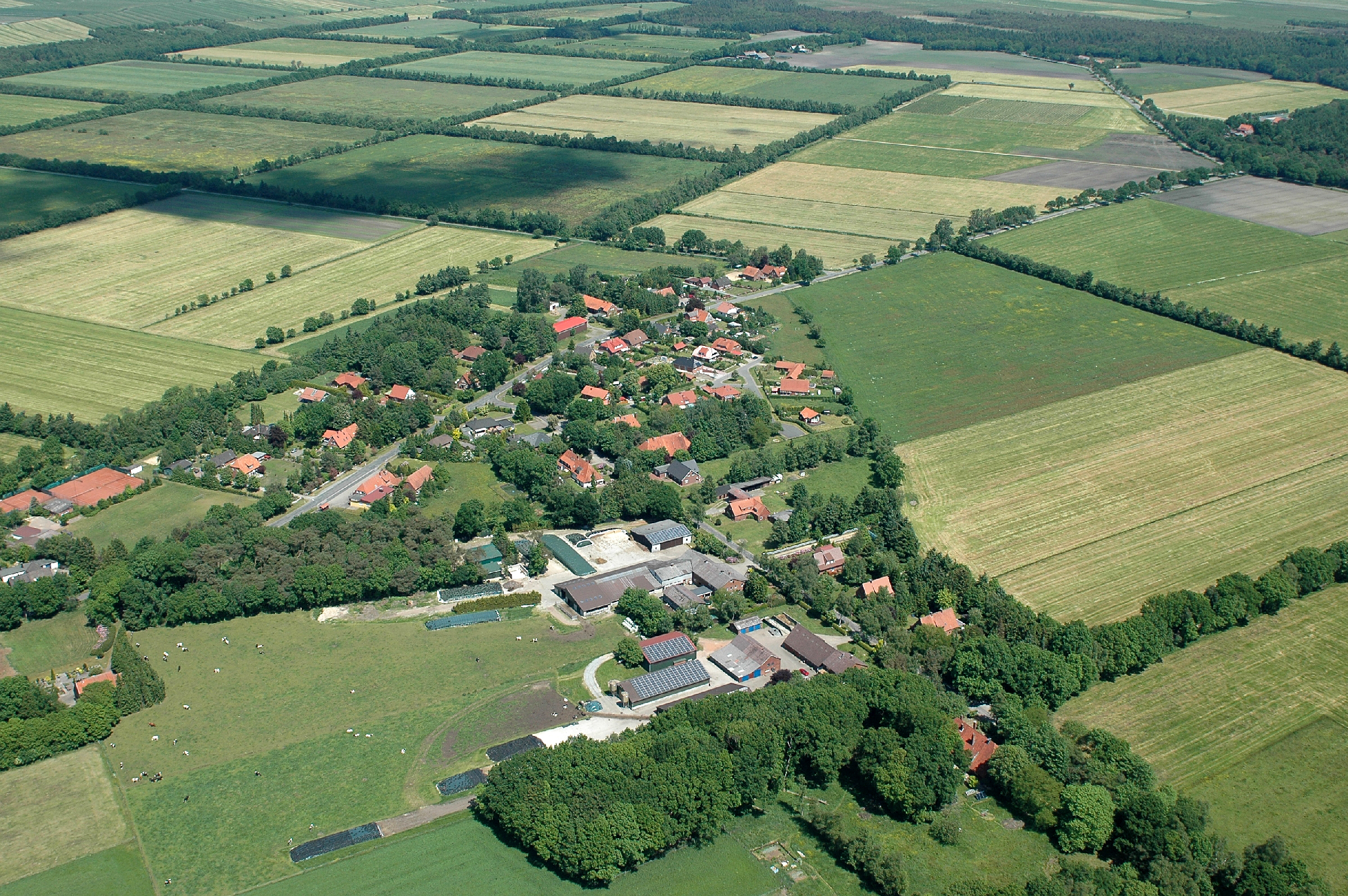 Ahlen-Falkenberg Fotoflug vom Flugplatz Nordholz-Spieka über Cuxhaven und Wilhelmshaven